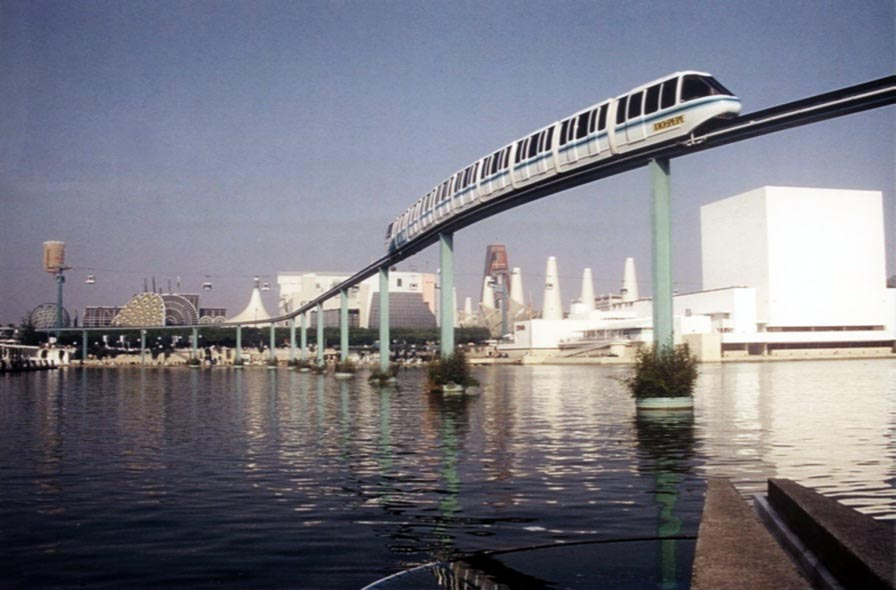 Tren elevado, Expo de Sevilla, 1992.